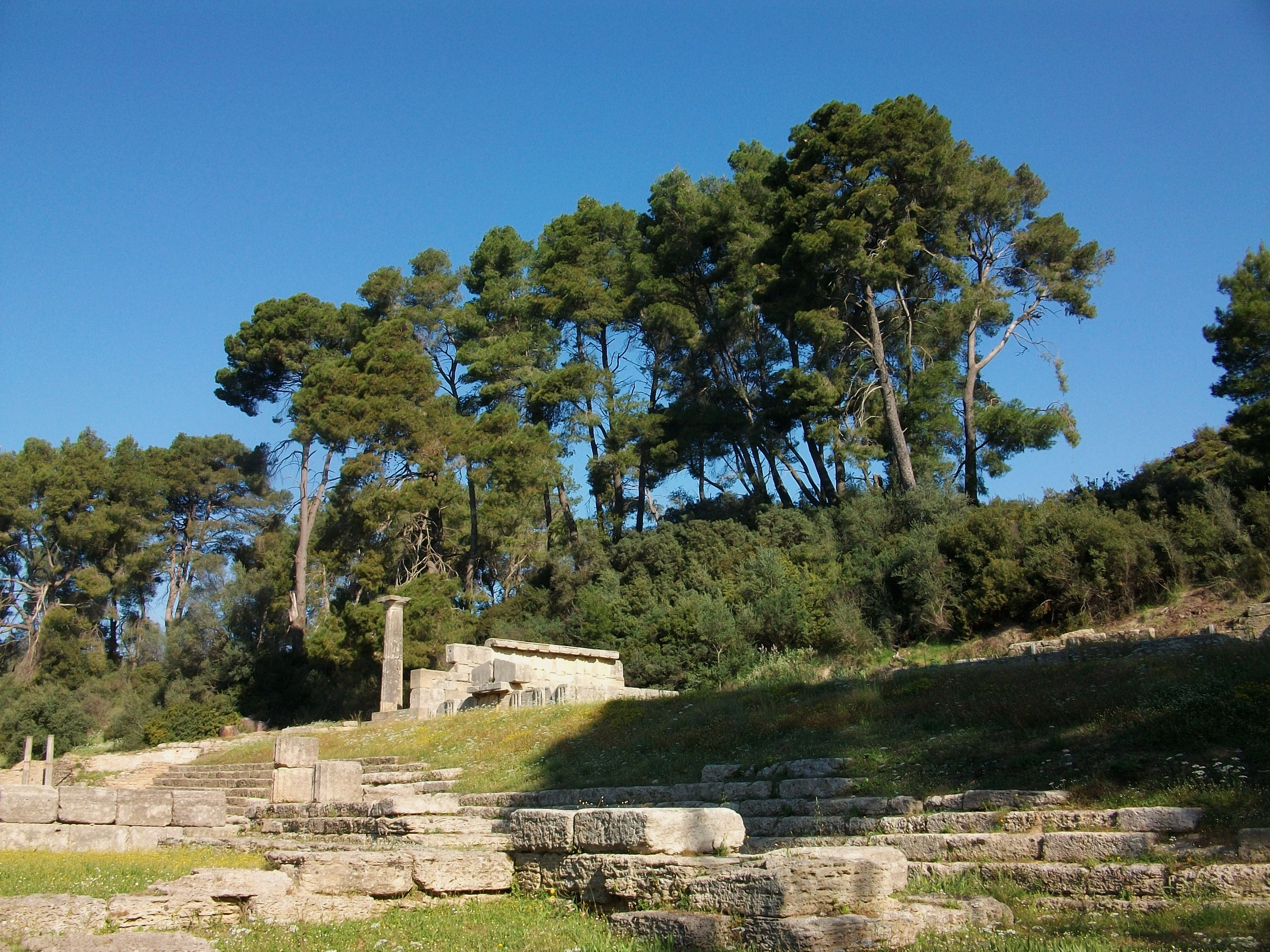 Terrassa dels tresors, Olímpia.